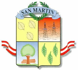 Escudo de Lamas